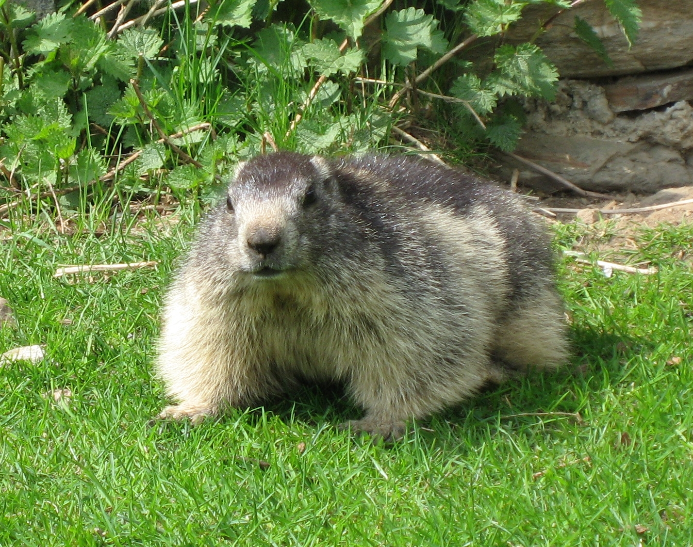 Marmota marmota in Parc de Merlet (Marmotte) Map: 45° 54' 26" N 6° 49' 2" E